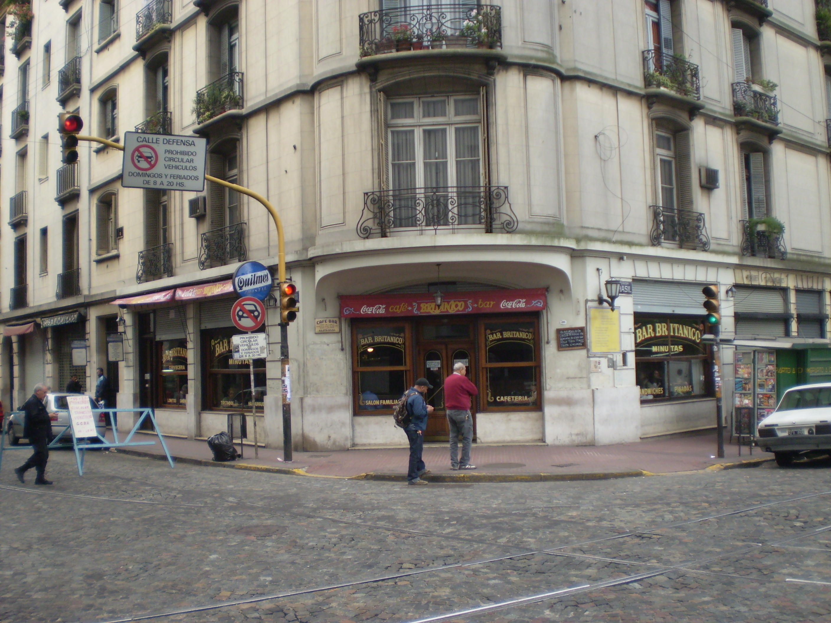 Bar "Británico" en la intersección de las calles Brasil y Defensa en Buenos Aires, Argentina